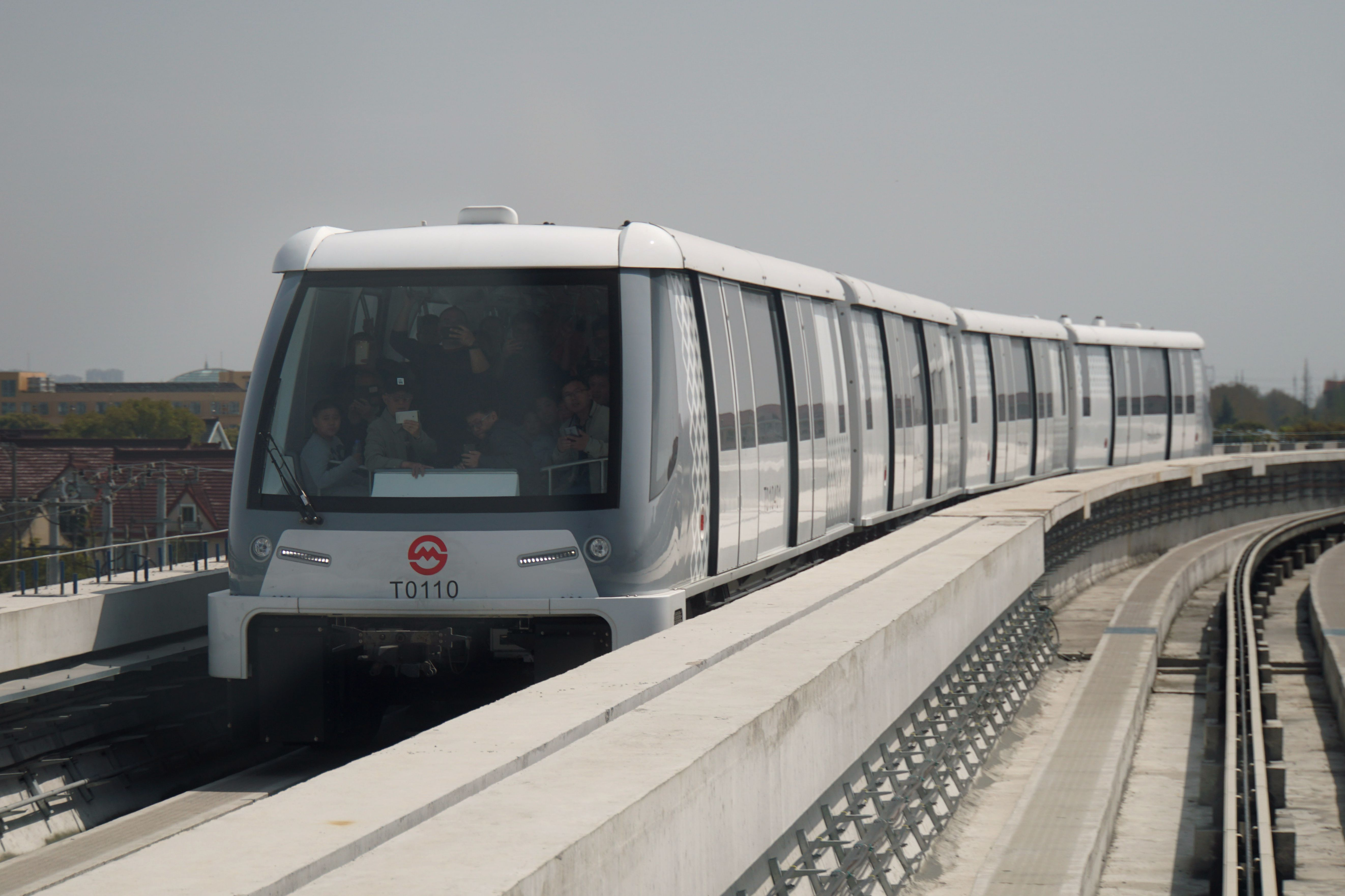 浦江线运行中